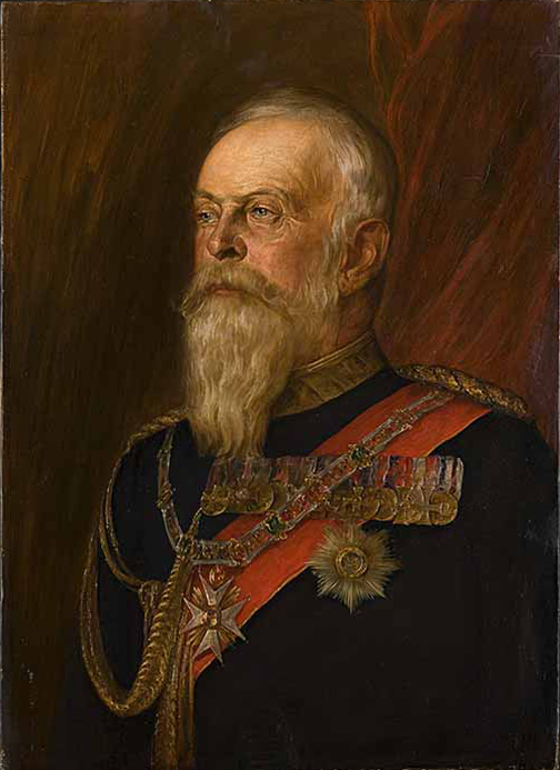 Der bayerische Prinzregent Luitpold (1821-1912)